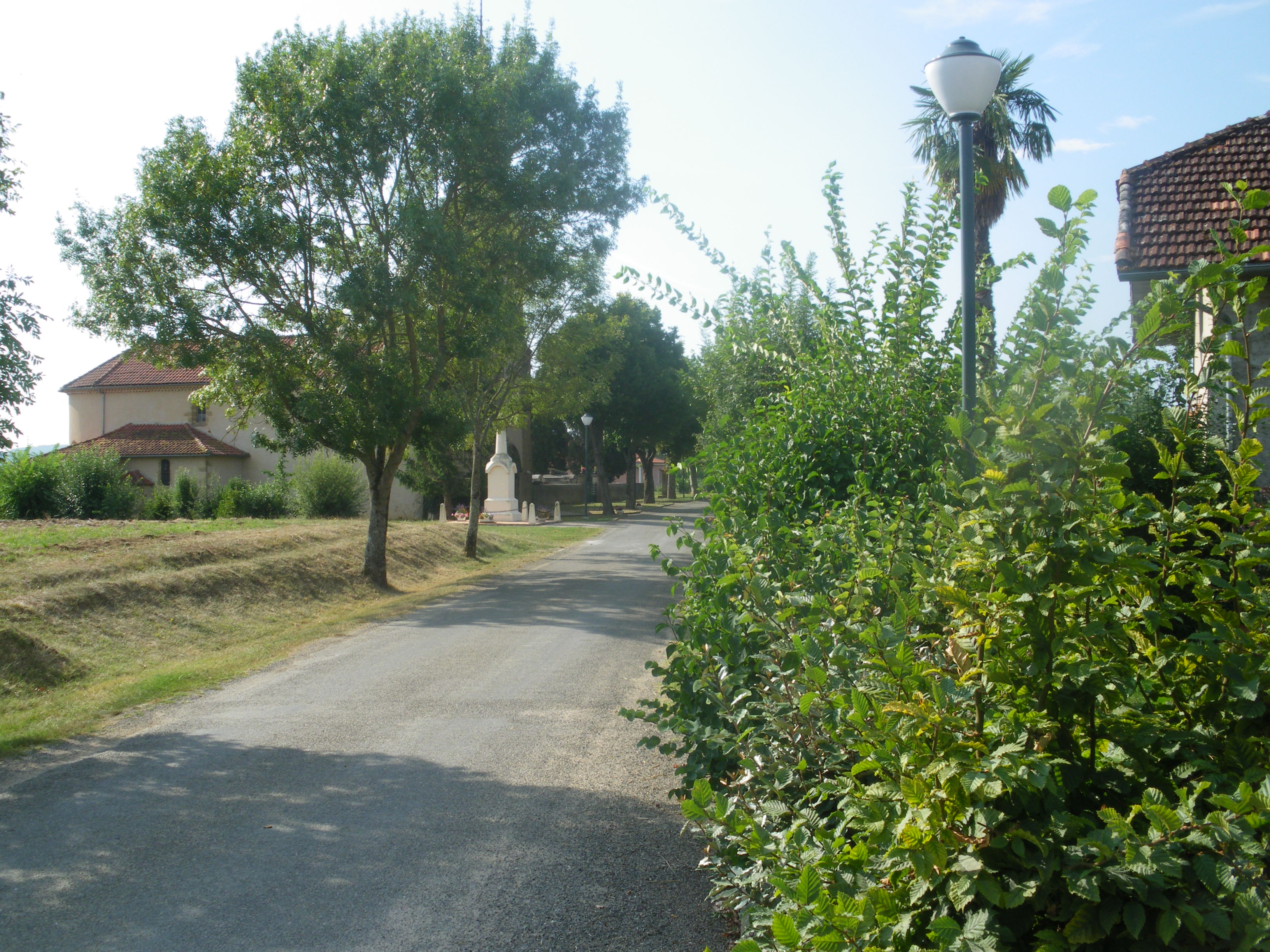 Lagarde-Hachan (Gers, France)